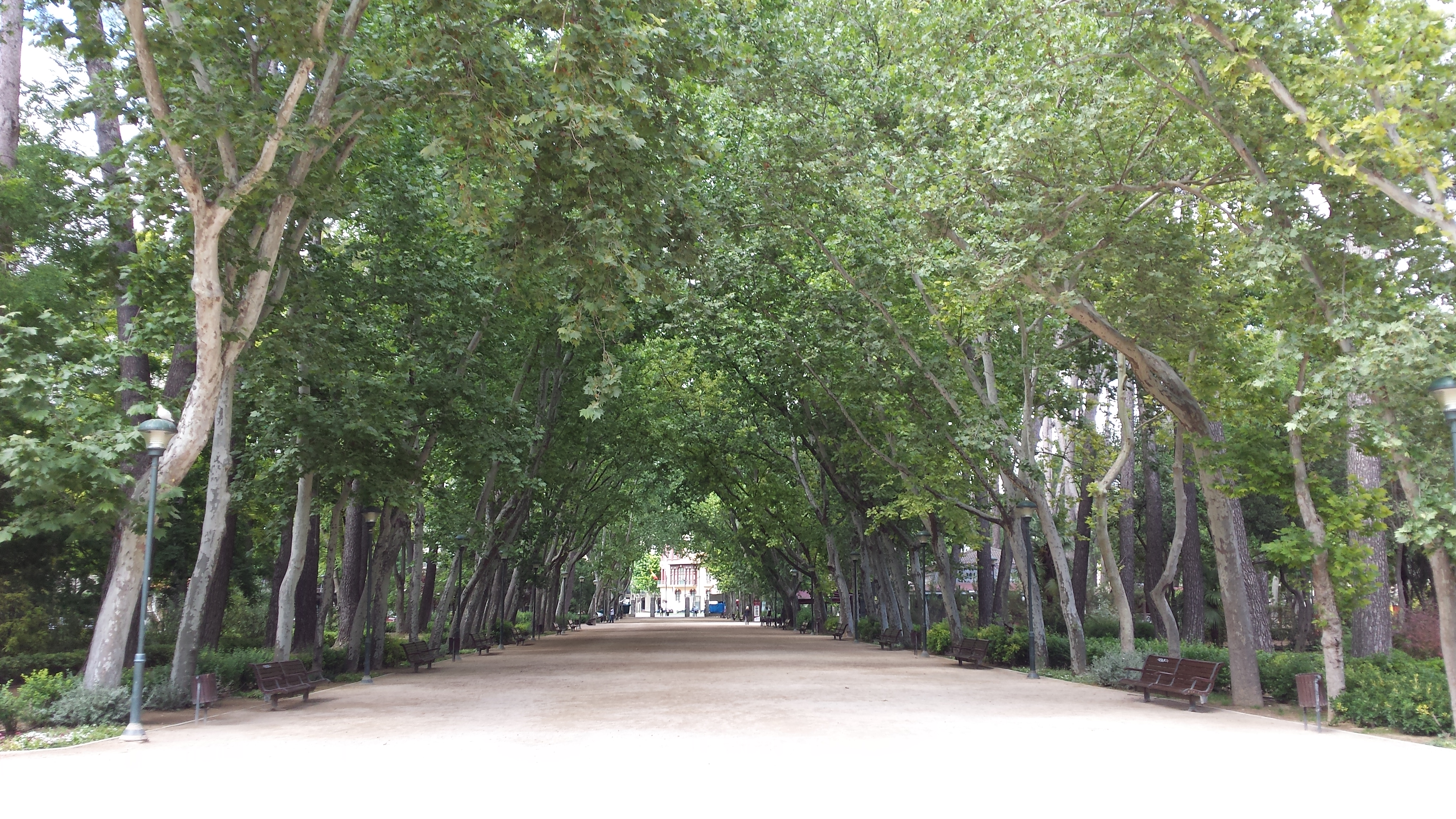 Paseo principal del Parque Abelardo Sánchez al norte. Albacete